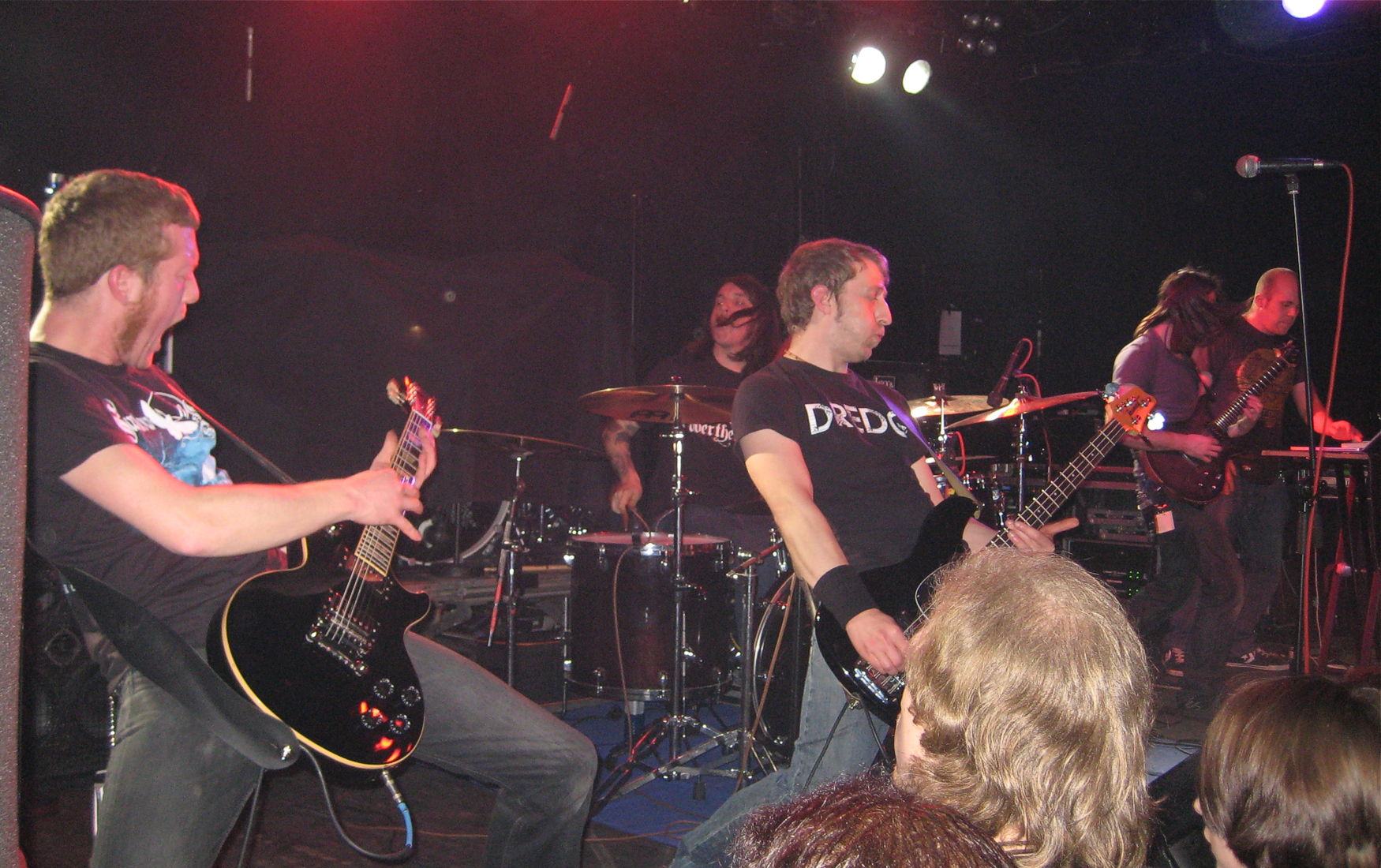 Long Distance Calling live @ Batschkapp, Frankfurt/Main